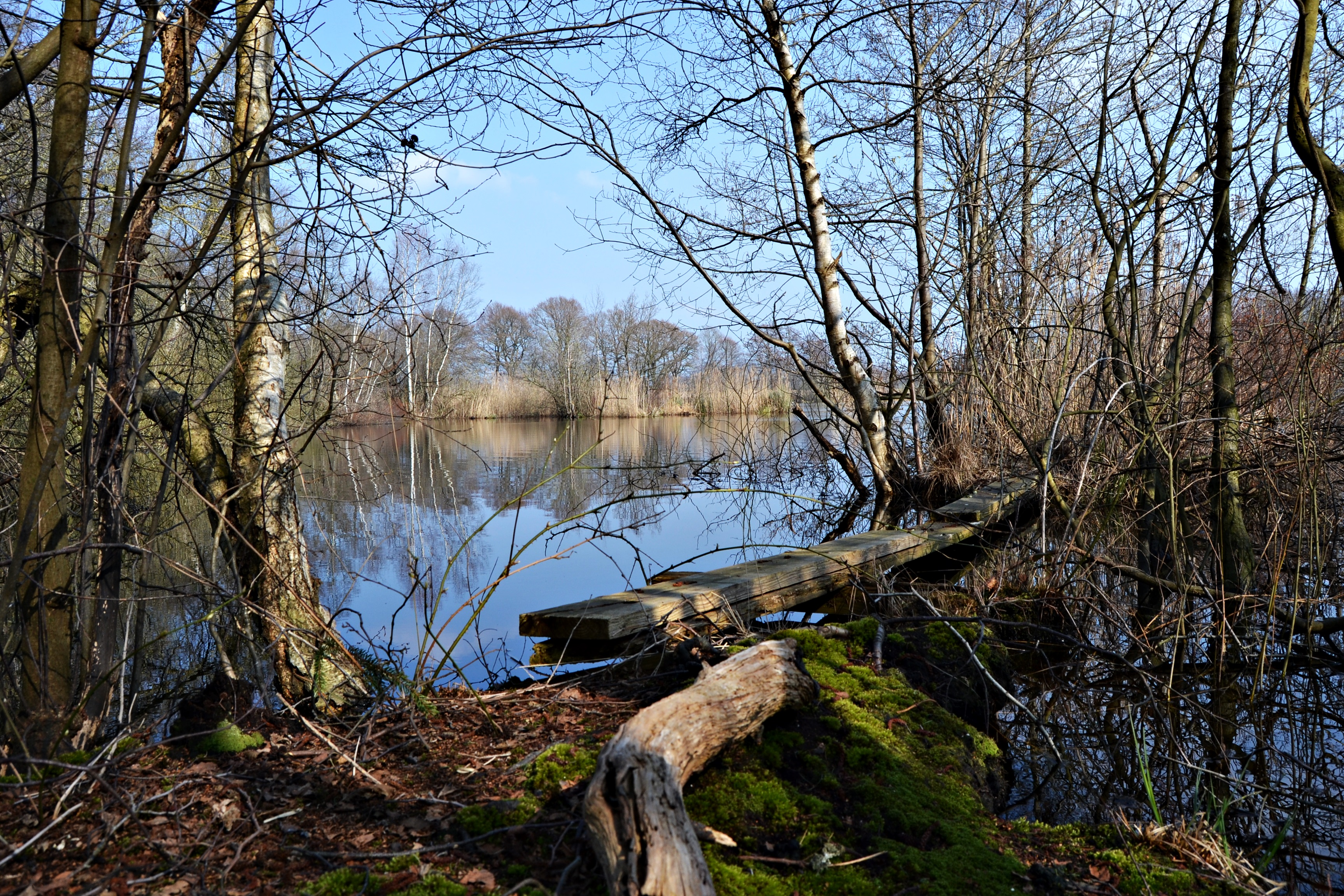 Naturschutzgebiet Darnsee in Bramsche (Landkreis Osnabrück)